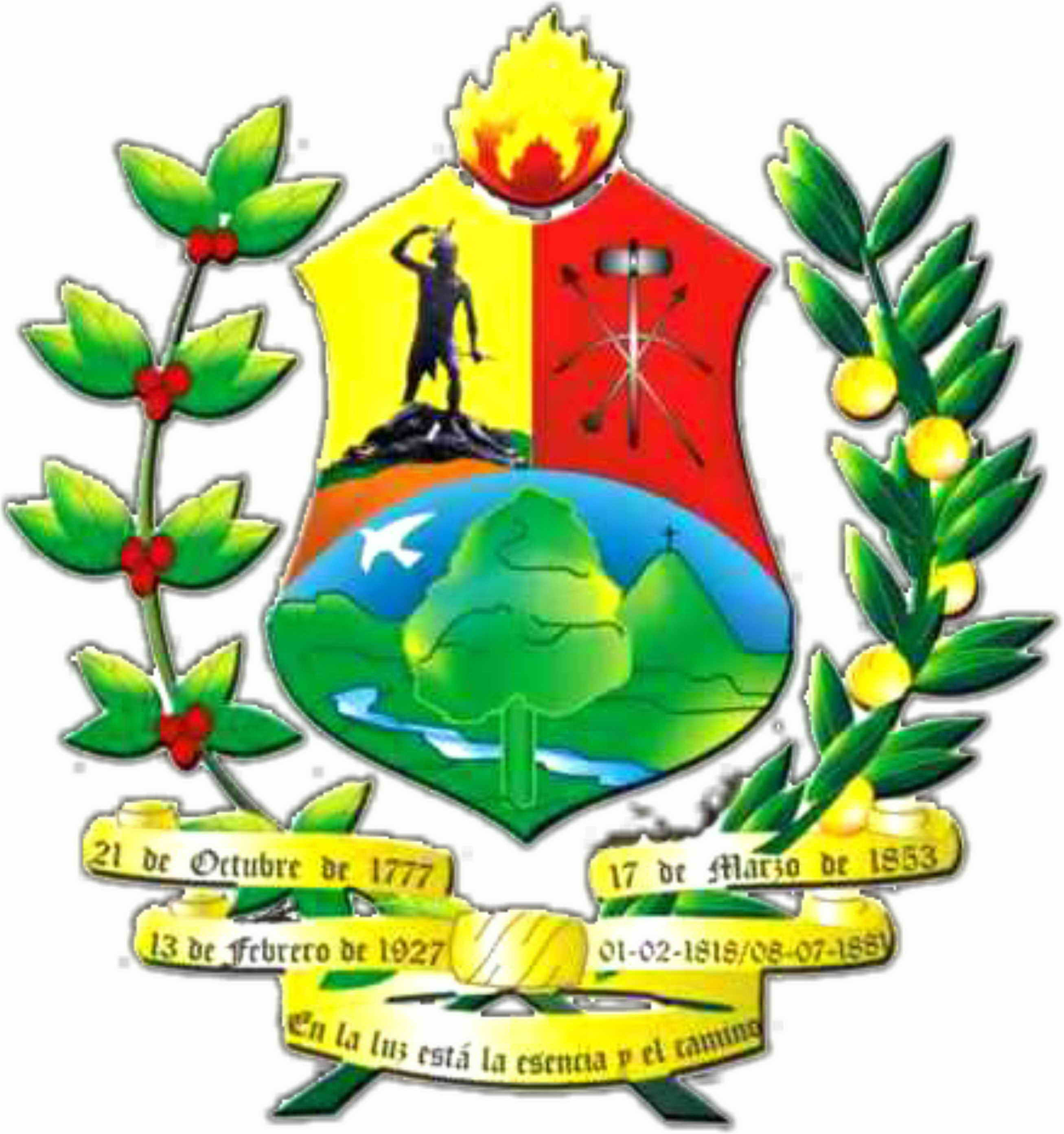 Escudo del Municipio Bolivariano Guaicaipuro del Estado Bolivariano de Miranda